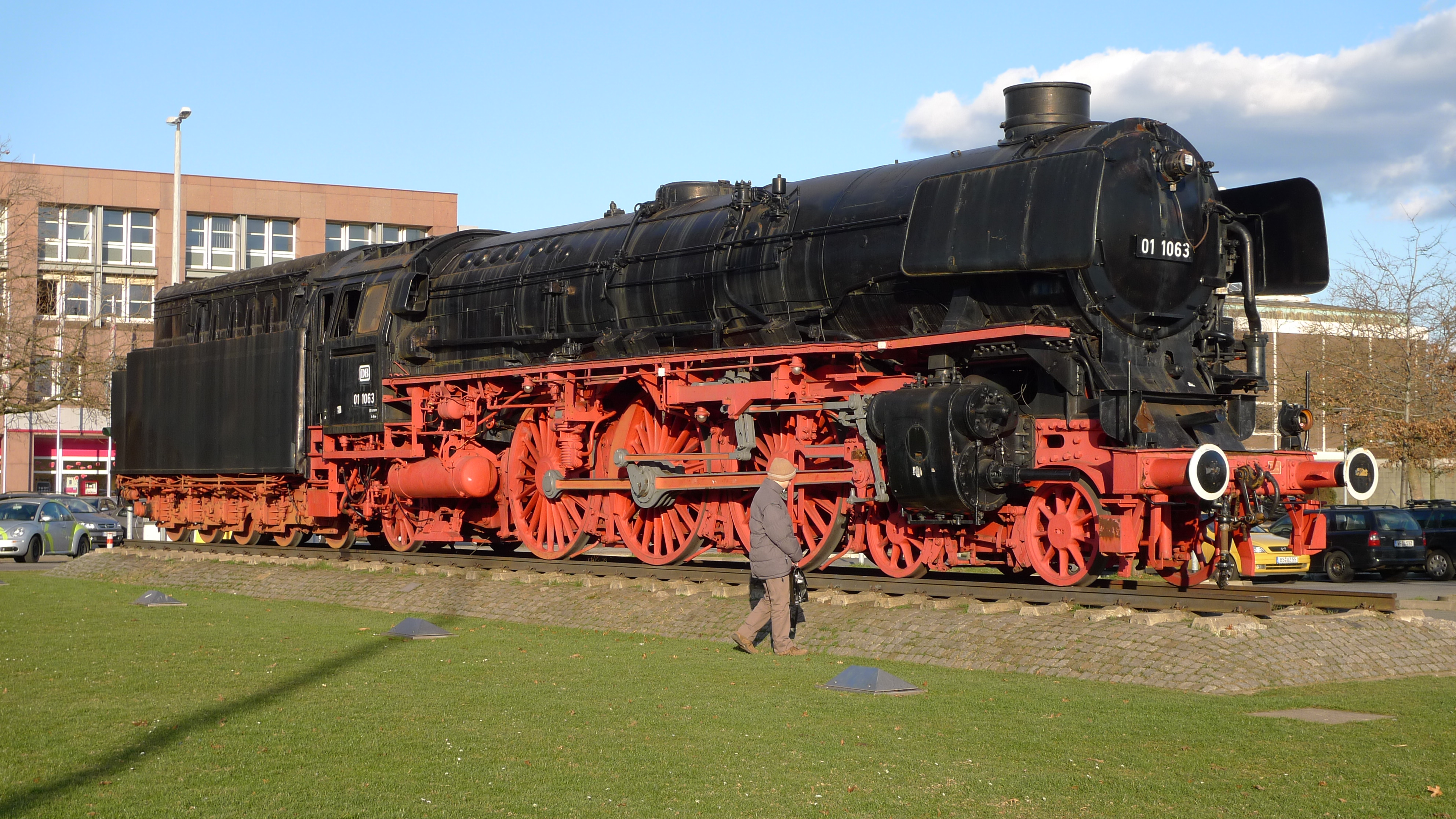 Die Lokomotive 01 1063 vor dem Braunschweiger Hauptbahnhof